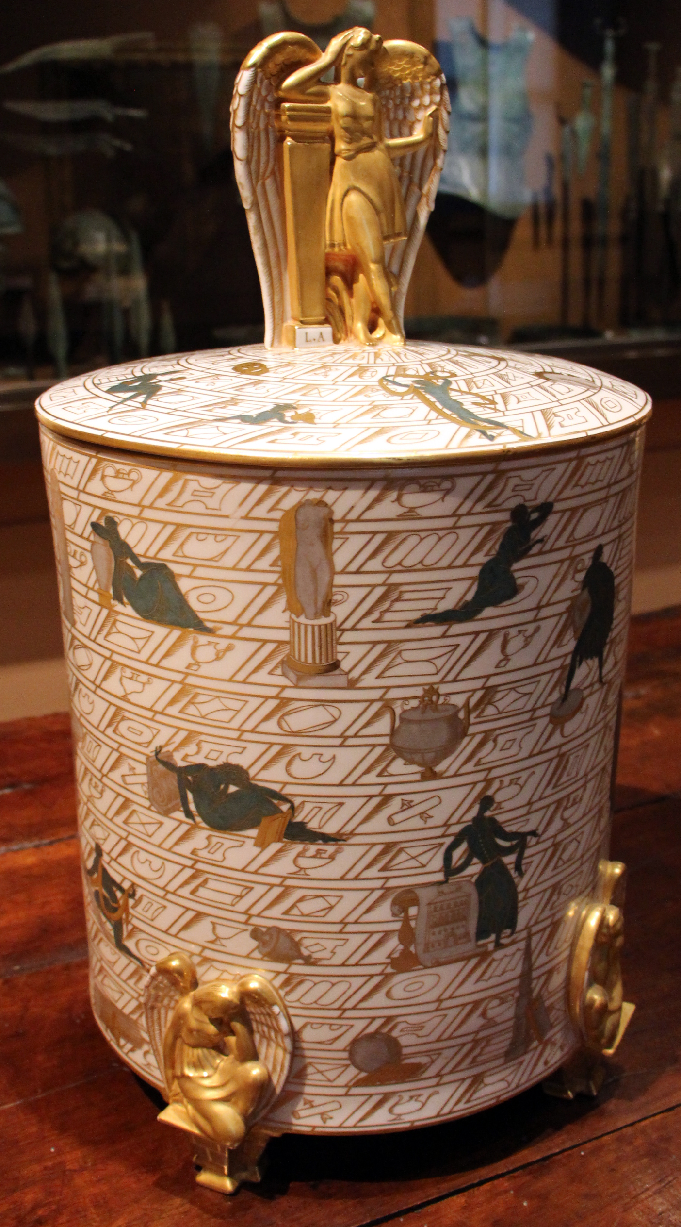 Museo Poldi Pezzoli